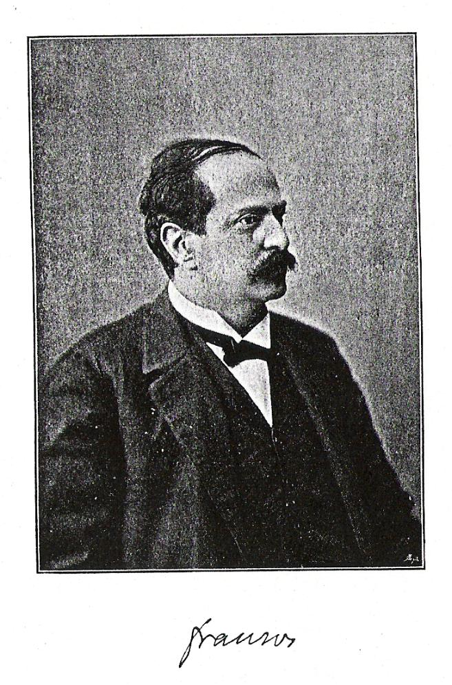 Karl Emil Franzos, Holzstich